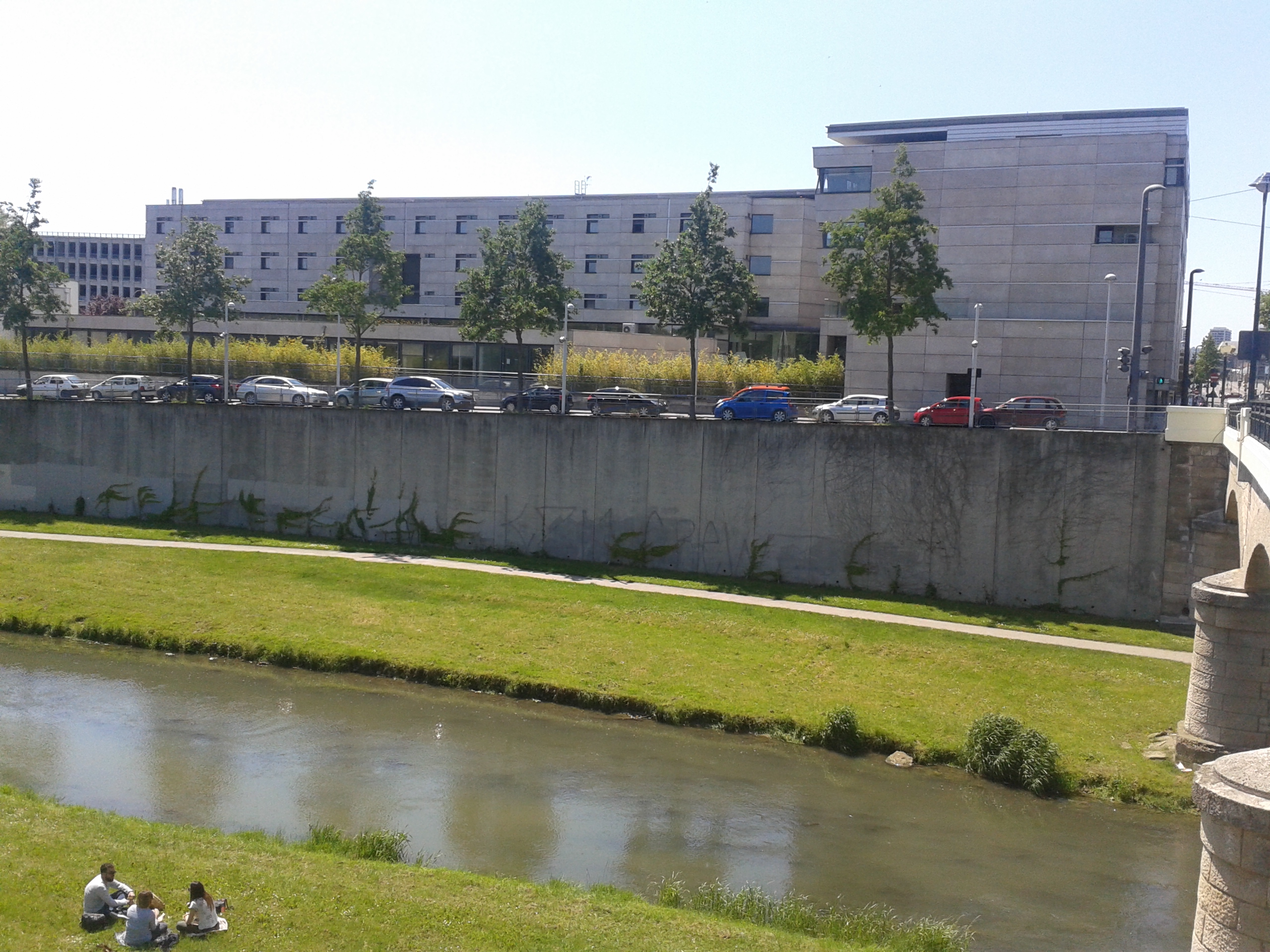 Vue extérieure de l'INSET